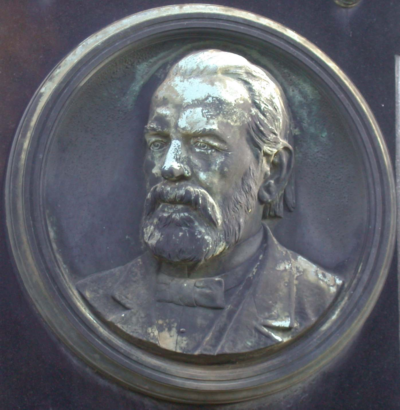 Portrait of Clemens Mueller (1828-1902)